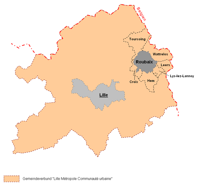 Lage der Gemeinde Roubaix im Gemeindeverbund Lille Métropole Communauté urbaine sowie der Nachbargemeinden.